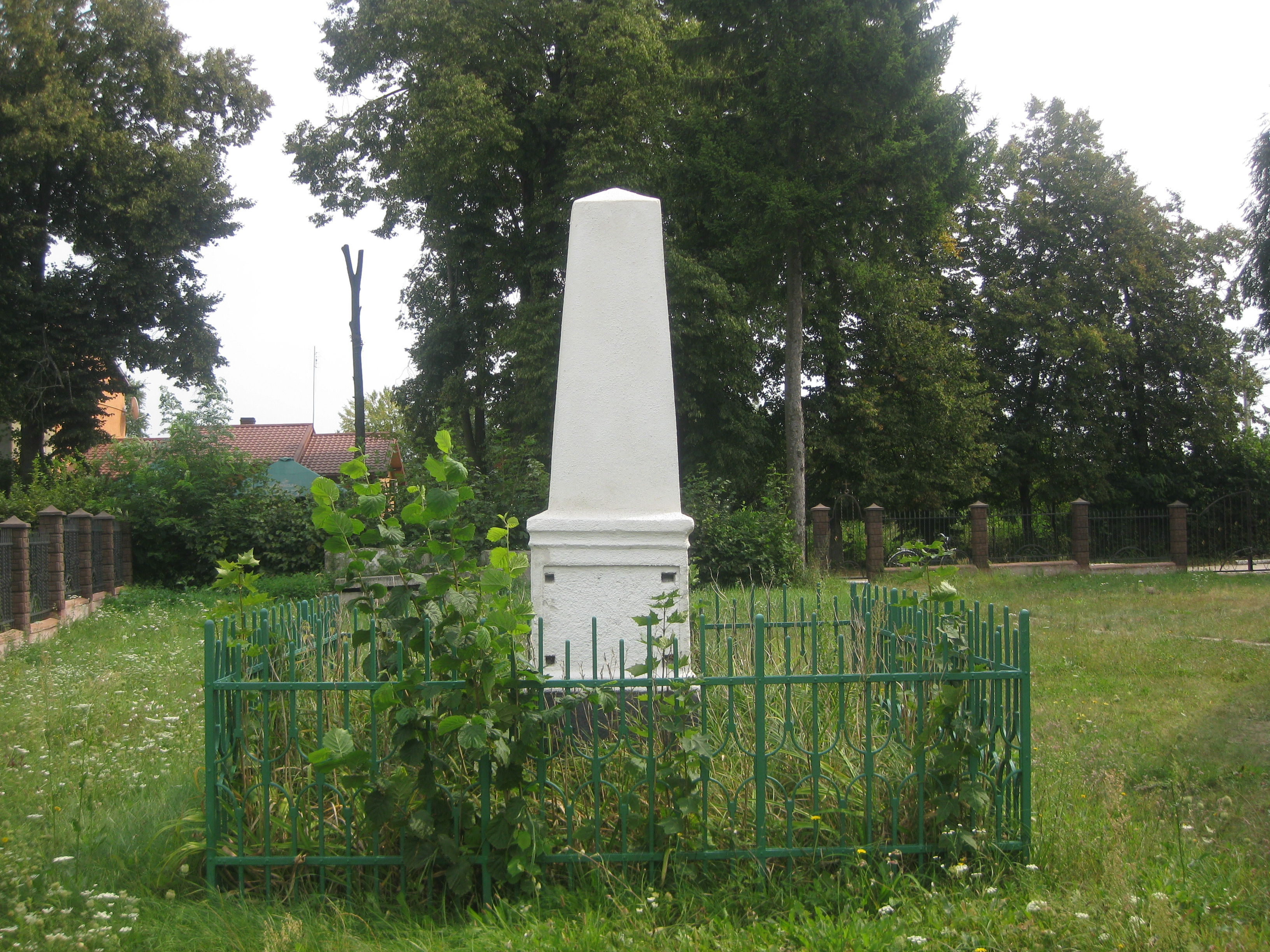 Пам'ятний знак в смт. Немирів Львівської області на честь 200-ї річниці Віденської битви, 1883 р.